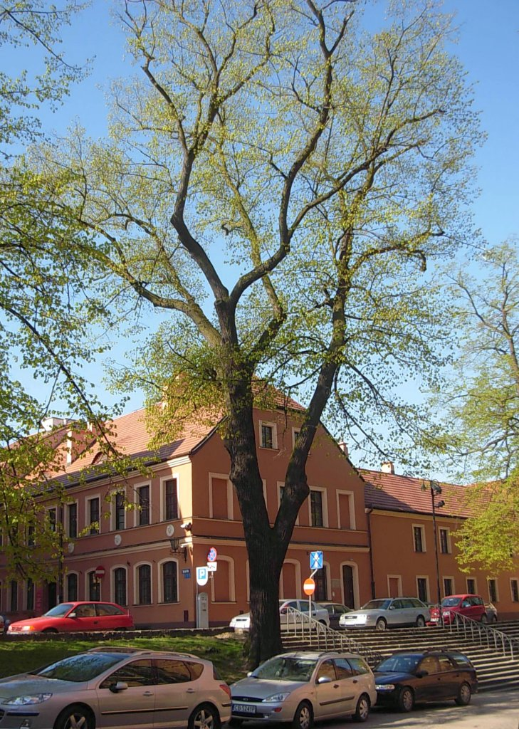 Lipa drobnolistna - pomnik przyrody na placu przed katedrą w Bydgoszczy